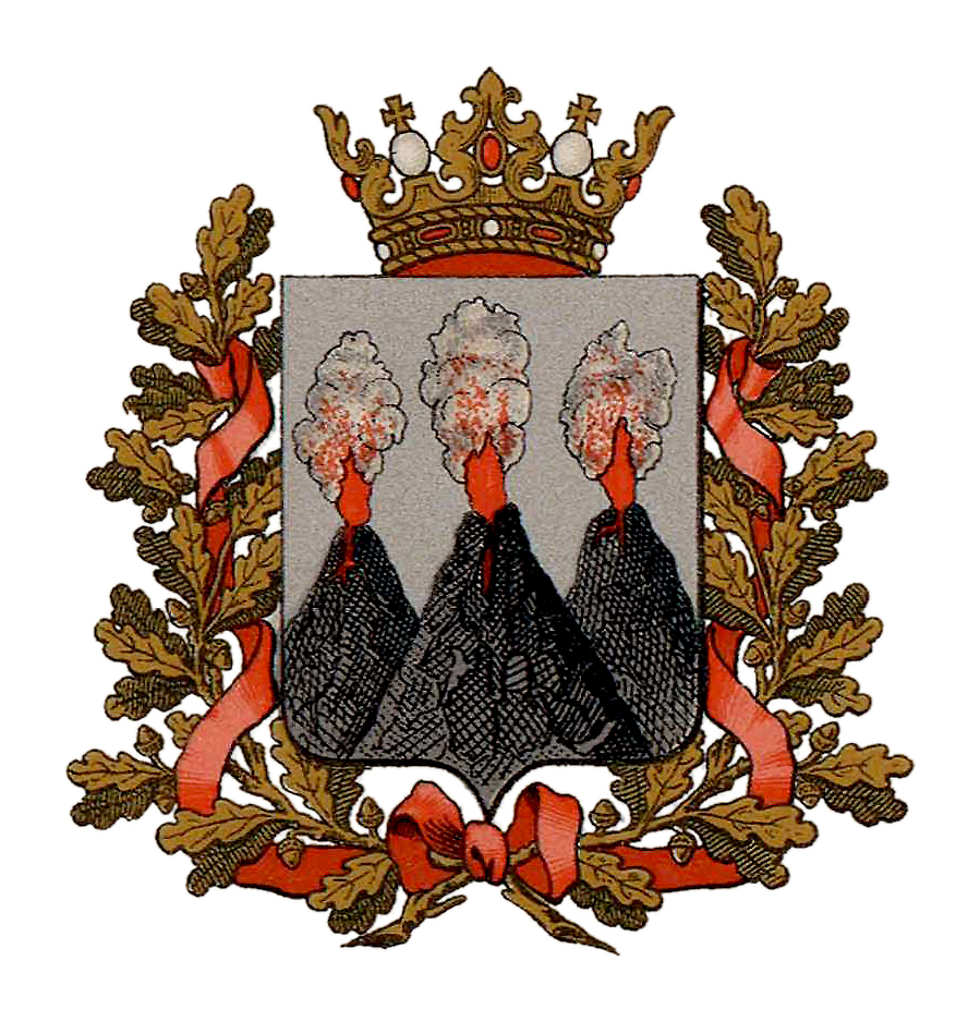 Герб Камчатской области (Российская империя. Высочайше утверждён 22 июня 1851 года)